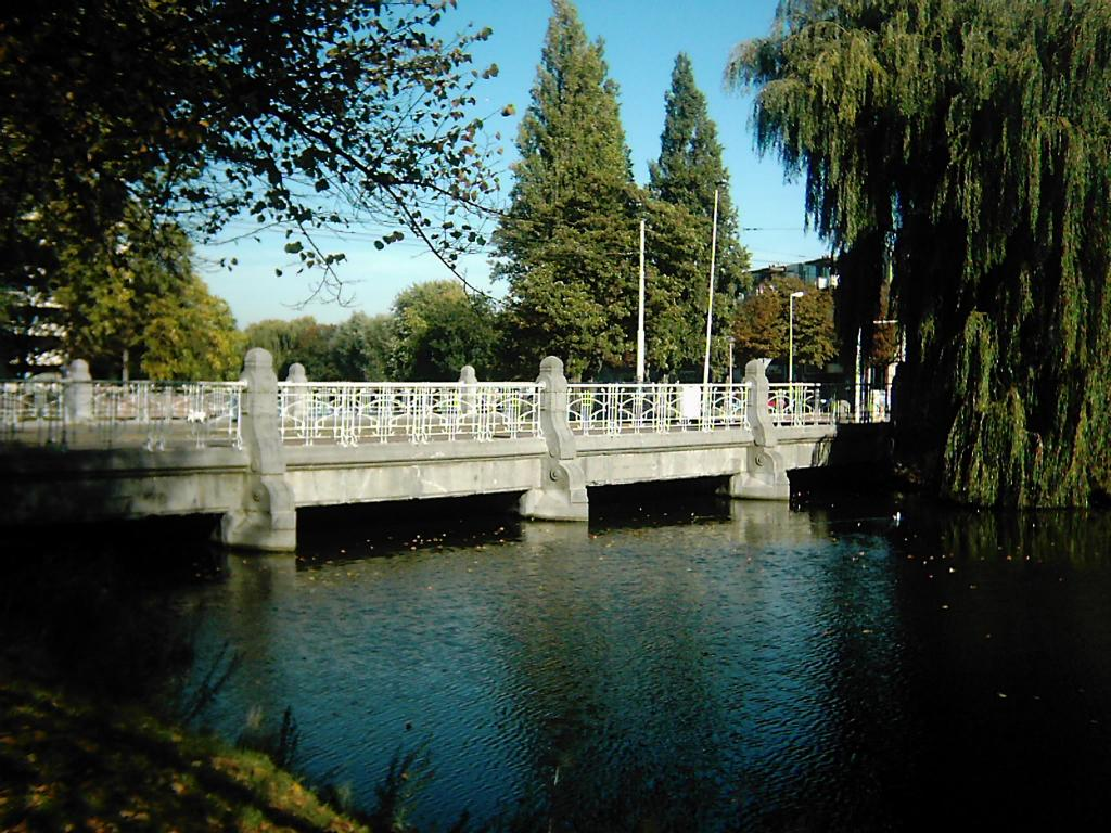 Rotterdam, Boezembrug, Kralingen. Rijksmonument.